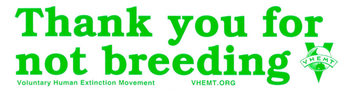 תודה לך שאינך מתרבה' - סלוגן של התנועה להכחדות מרצון של האנושות' אישור שימוש ביצירה מופיע בתחתית דף אתר התנועה: Except where noted, works on this site are licensed under a Creative Commons Attribution 3.0 United States License. org